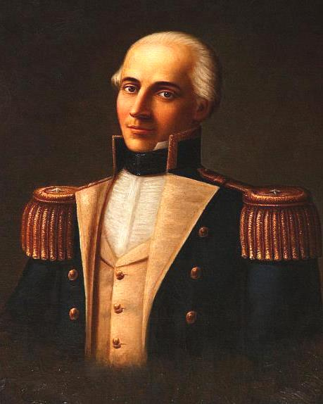 Cap. Juan de Salinas, prócer de la Independencia ecuatoriana. Participó de la gesta del Primer Grito de Independencia el 10 de agosto de 1809. Óleo sobre lienzo del pintor quiteño Manuel Salas Alzamora. La obra se encuentra en el Salón de los Próceres del Palacio de Najas (Quito).